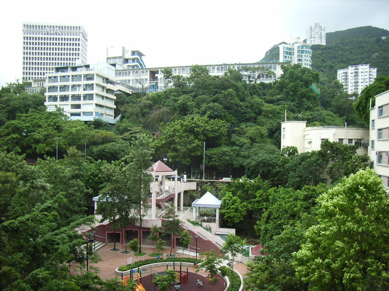 Wan Chai Park 灣仔公園 BY RICHARD MARTIN.